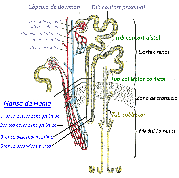 Modificació de l'Arxiu original. S'han modificat les etiquetes de text i s'han traduit al català